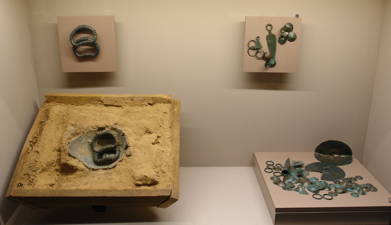 Fund aus der späten Bronzezeit (ZAC des Feuilly, Saint-Priest, Rhône, Auvergne-Rhône-Alpes) ausgestellt im Gallisch-Römischen Museum in Lyon